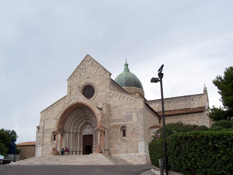 Ancona - Basilica di S. Ciriaco